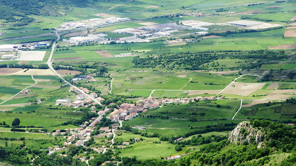 Araia (Asparrena), Aratz menditik ikusia